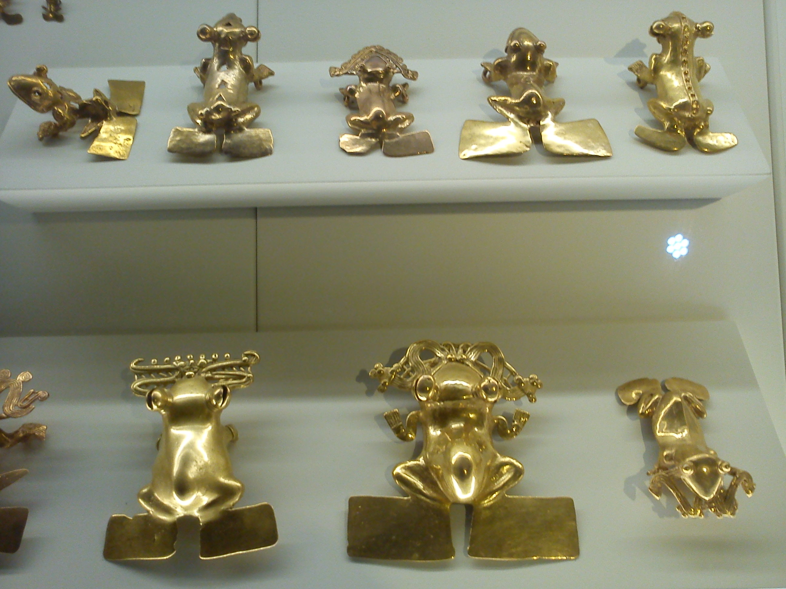 Ranitas de oro, provenientes del Pacífico sur de Costa Rica. 700-1550. Museo del Oro Precolombino. San José de Costa Rica.